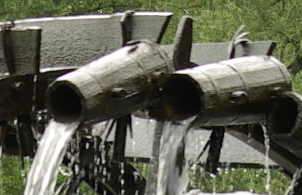 Schöpfrad Vierzigmannrad an der Regnitz in Möhrendorf.